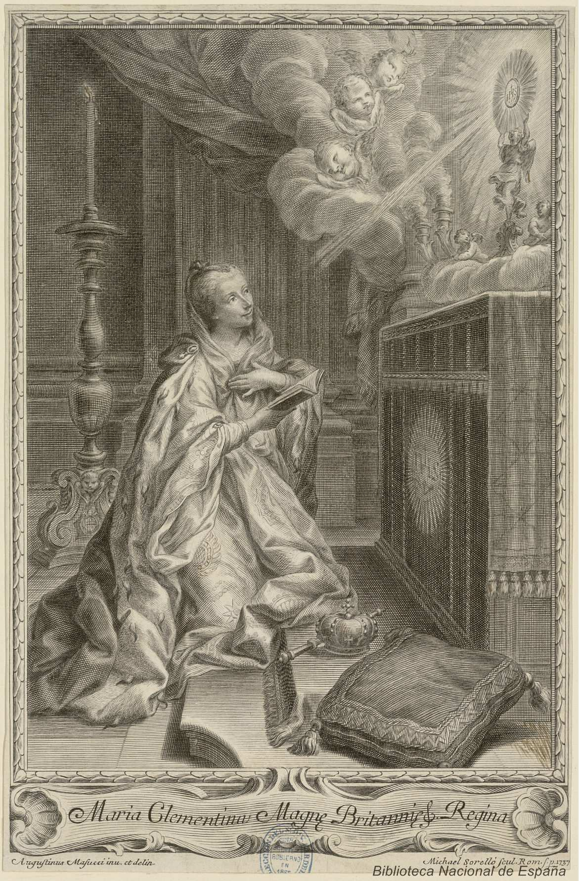 María Clementina princesa de Gales. Inscripción: Maria Clementina Magne Britannis & Regina Augustinus Masucci inu. et delin. ; Michael Sorelló Scul. Rom. S. p Buril, Biblioteca Nacional de España